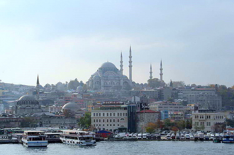 Süleymaniye Camii ; Suleyman (Magnificient)Mosque,Istanbul, Turkey